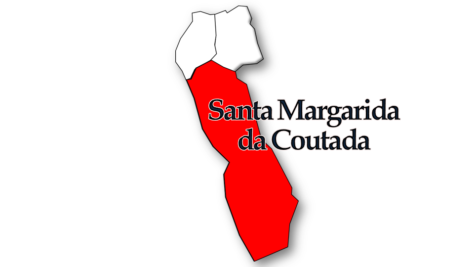 Evolução da População